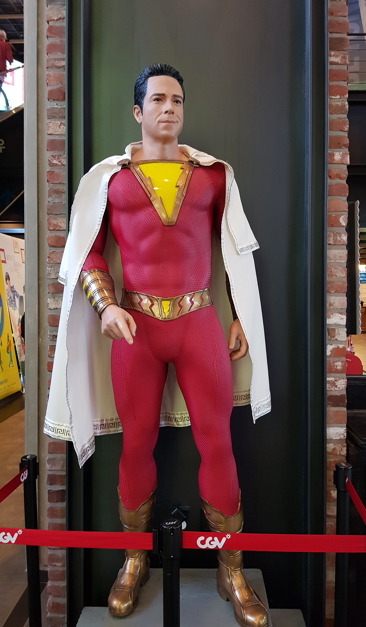 샤잠 CGV용산아이파크몰 광고물